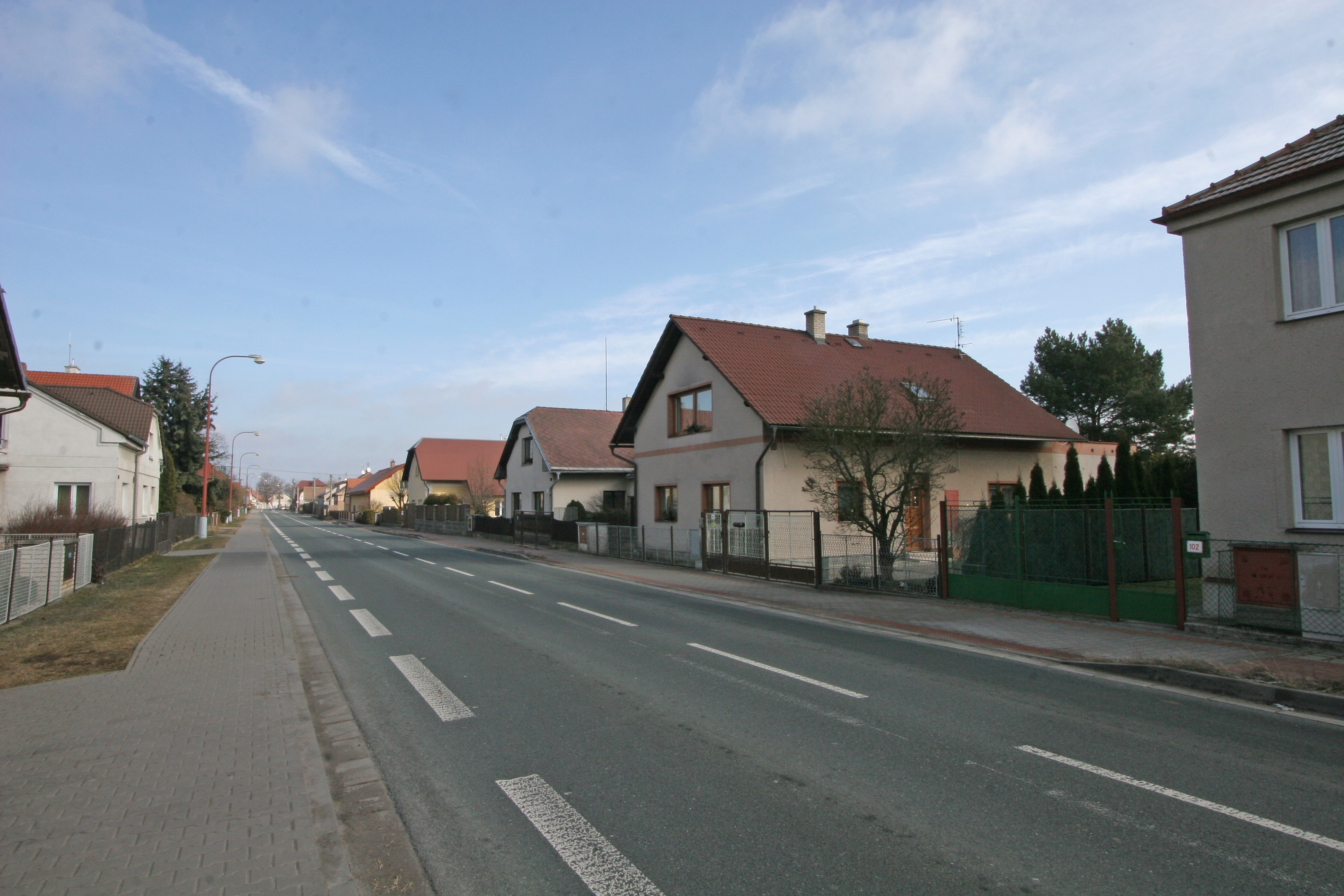 Česky: Libišany čp. 98